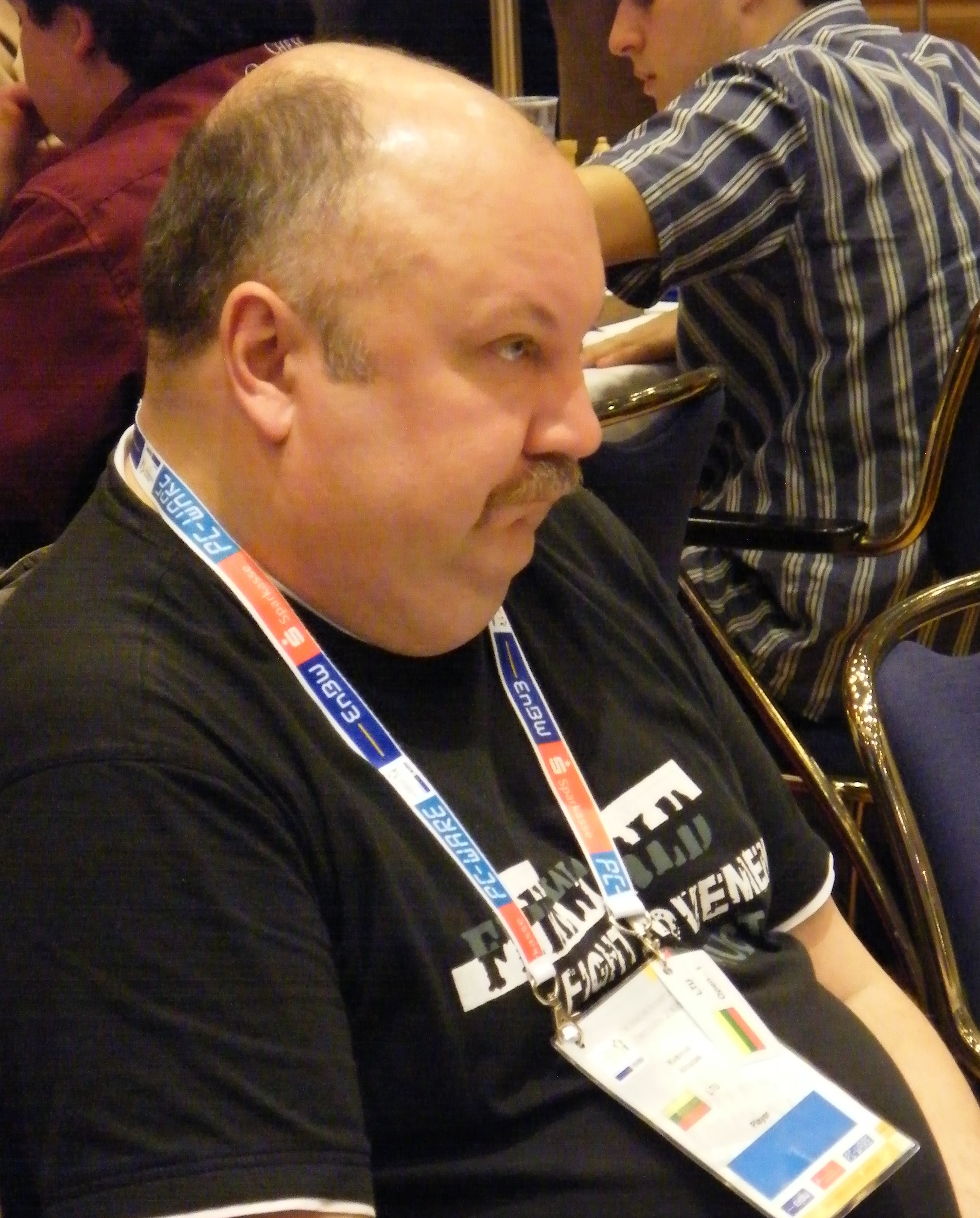 Aloizas Kveinis bei der Schacholympiade 2008 in Dresden